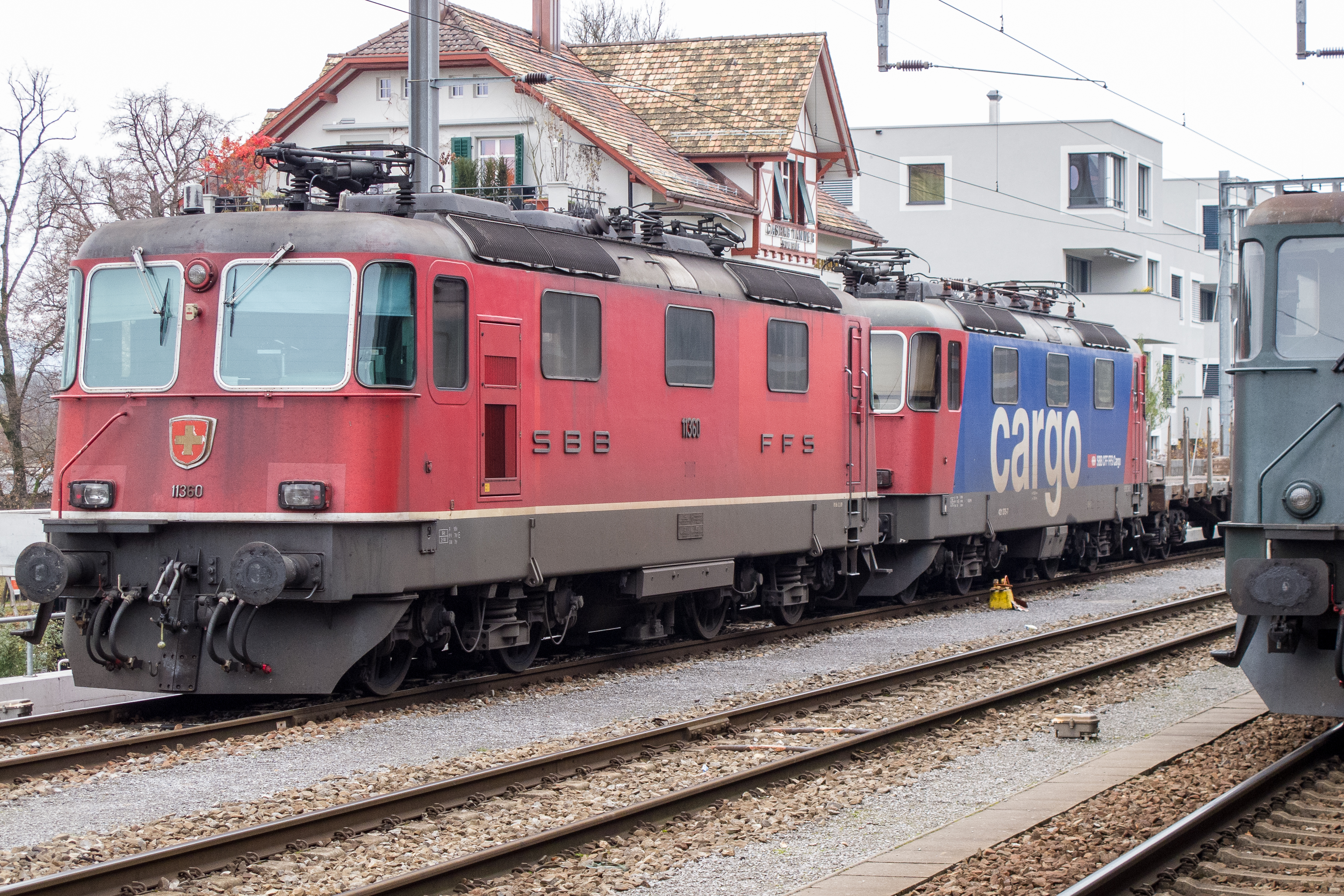 SBB Re 4/4 III Nr. 11360 (Re 430) und SBB Re 421 im Bahnhof Frauenfeld